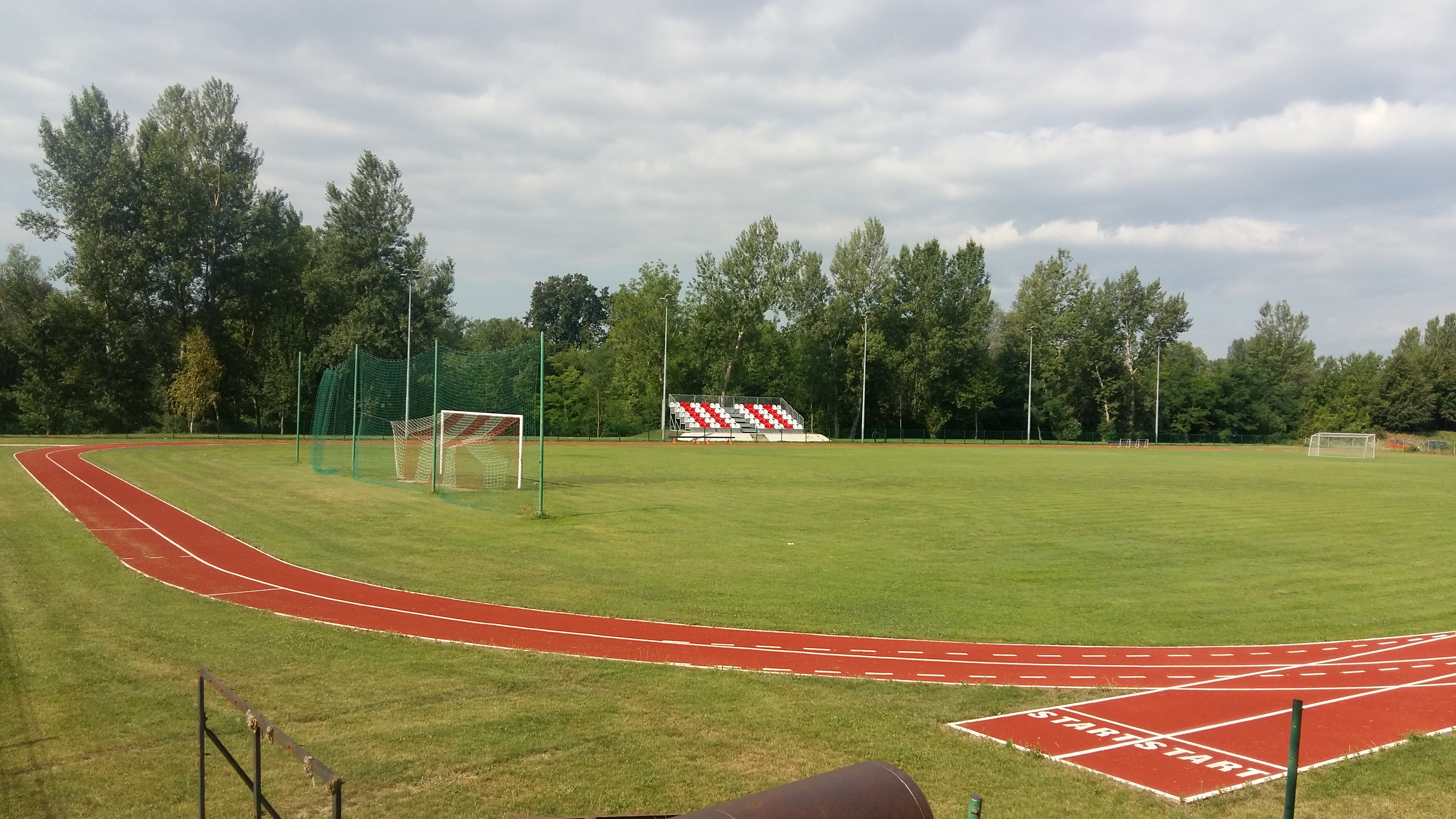 Hajdoše